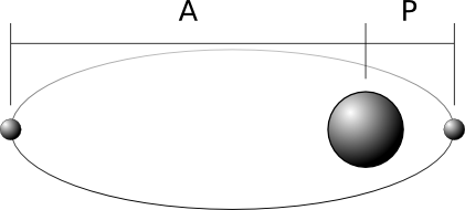 Diagramo de apsidoj: A - apoapsido; P - periapsido.